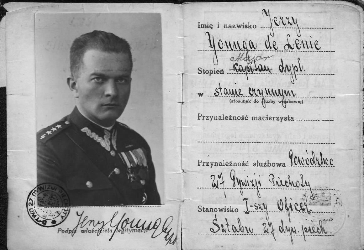 Zdjecie z Ksiazeczki Wojskowej J. Younga de Lenie, rok 1934